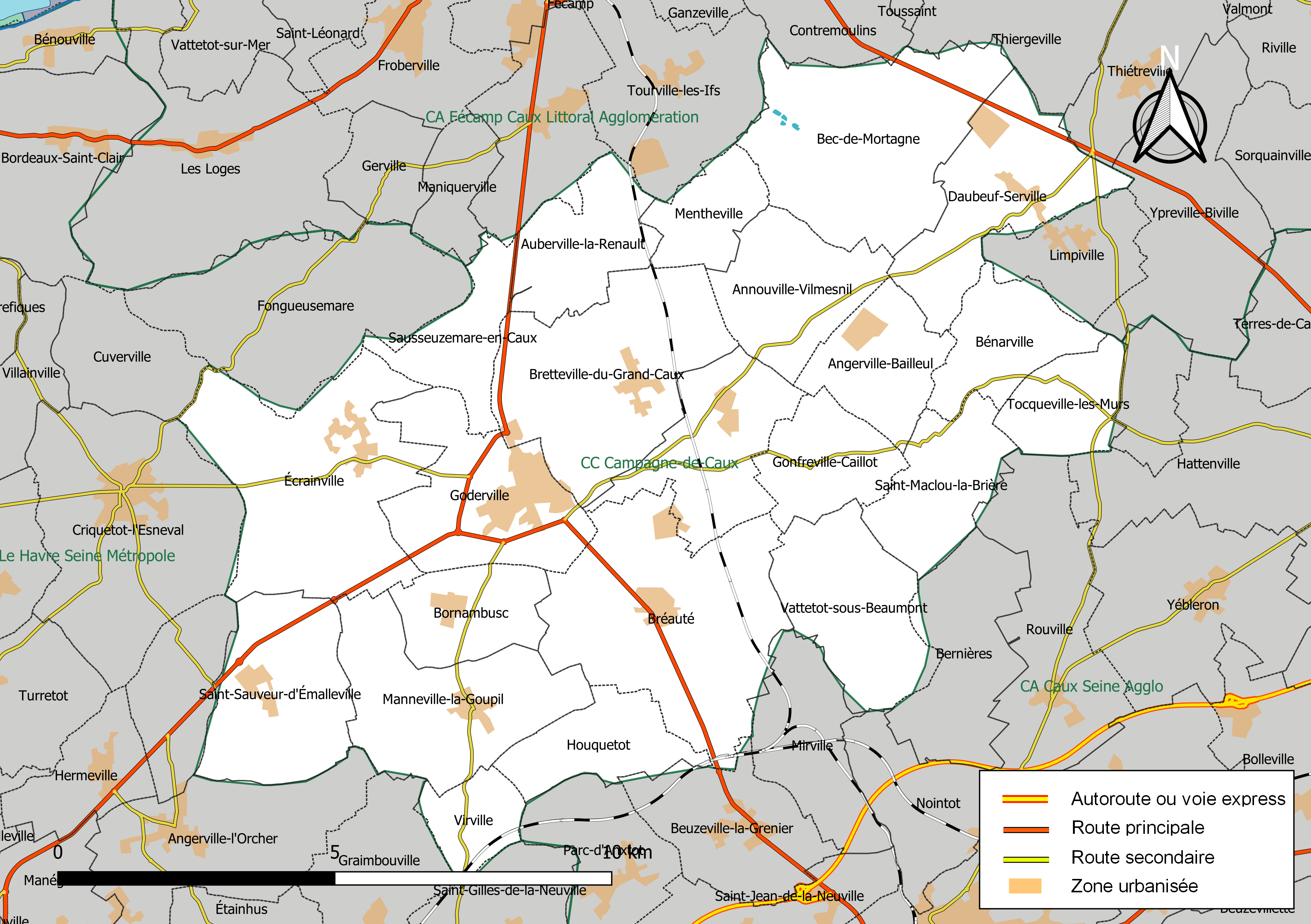 Carte géographique de la Communauté de communes Campagne de Caux, département de la Seine-Maritime, France. Composition au 1er janvier 2019.